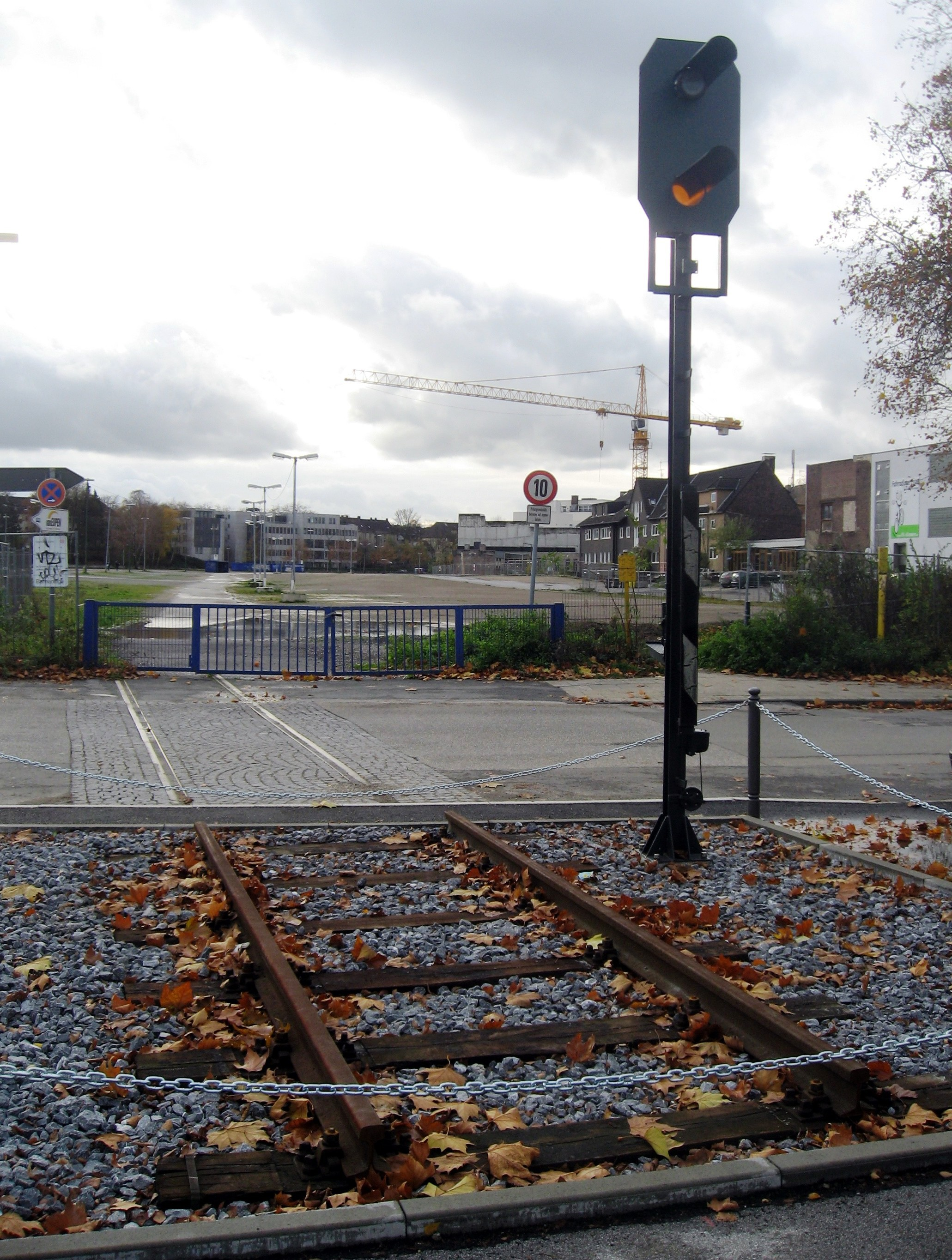 Eisenbahn-Ensemble mit Informationstafel (nicht im Bild) zur Erinnerung an den ehemaligen Bahnhof in Essen-Rüttenscheid